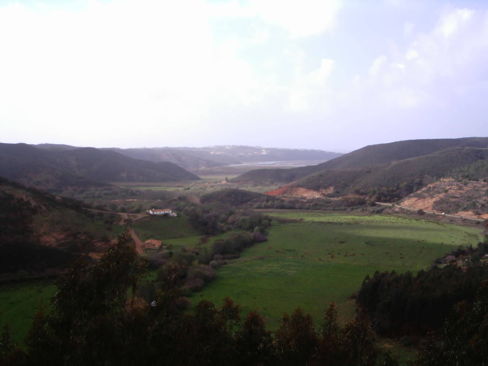 Vista do Castelo de Aljezur, Aljezur, Portugal.